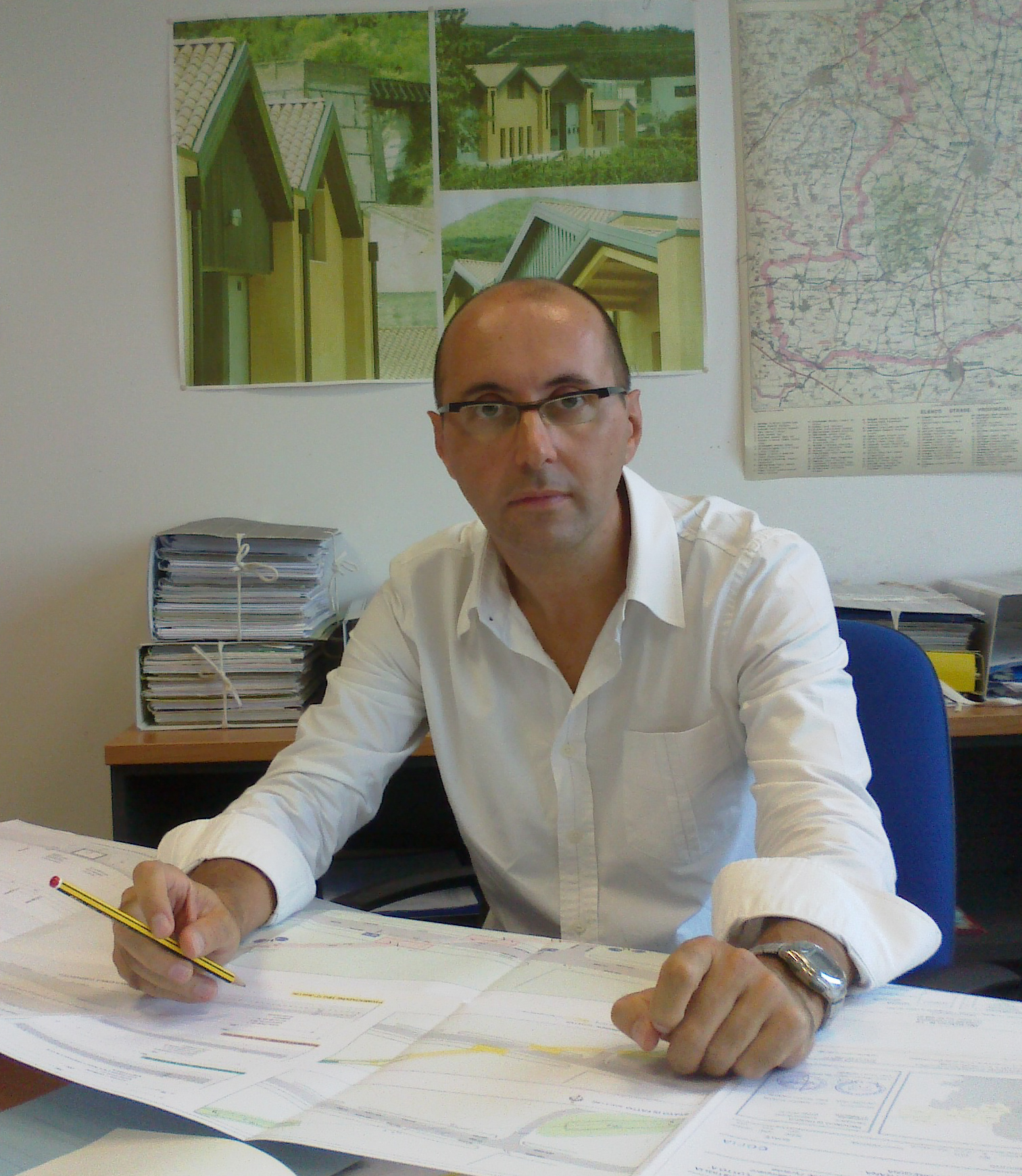 Nicola Gennaro foto